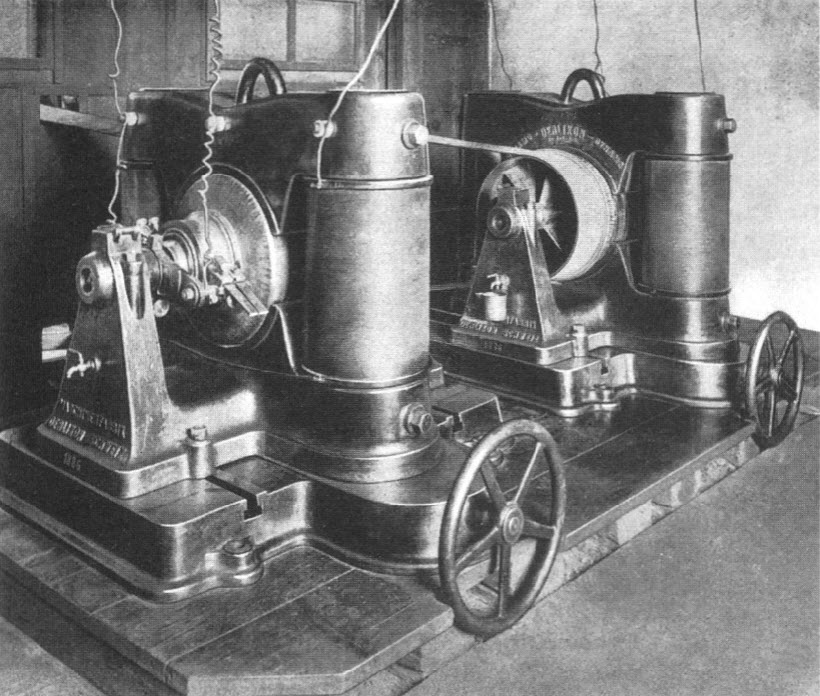 Die beiden Gleichstromgeneratoren im Kraftwerk Kriegstetten. Erbaut von C.E.L Brown in der Maschinenfabrik Oerlikon. Leistung pro Generator: ca. 18 kW. Das Handrad vorne an jedem Generatore triebe eine Spindel an, mit der die Grundplatte der Generatoren verschoben werden konnte um die mechanischen Spannung der von der Turbine kommenden Treibriemen zu regulieren.